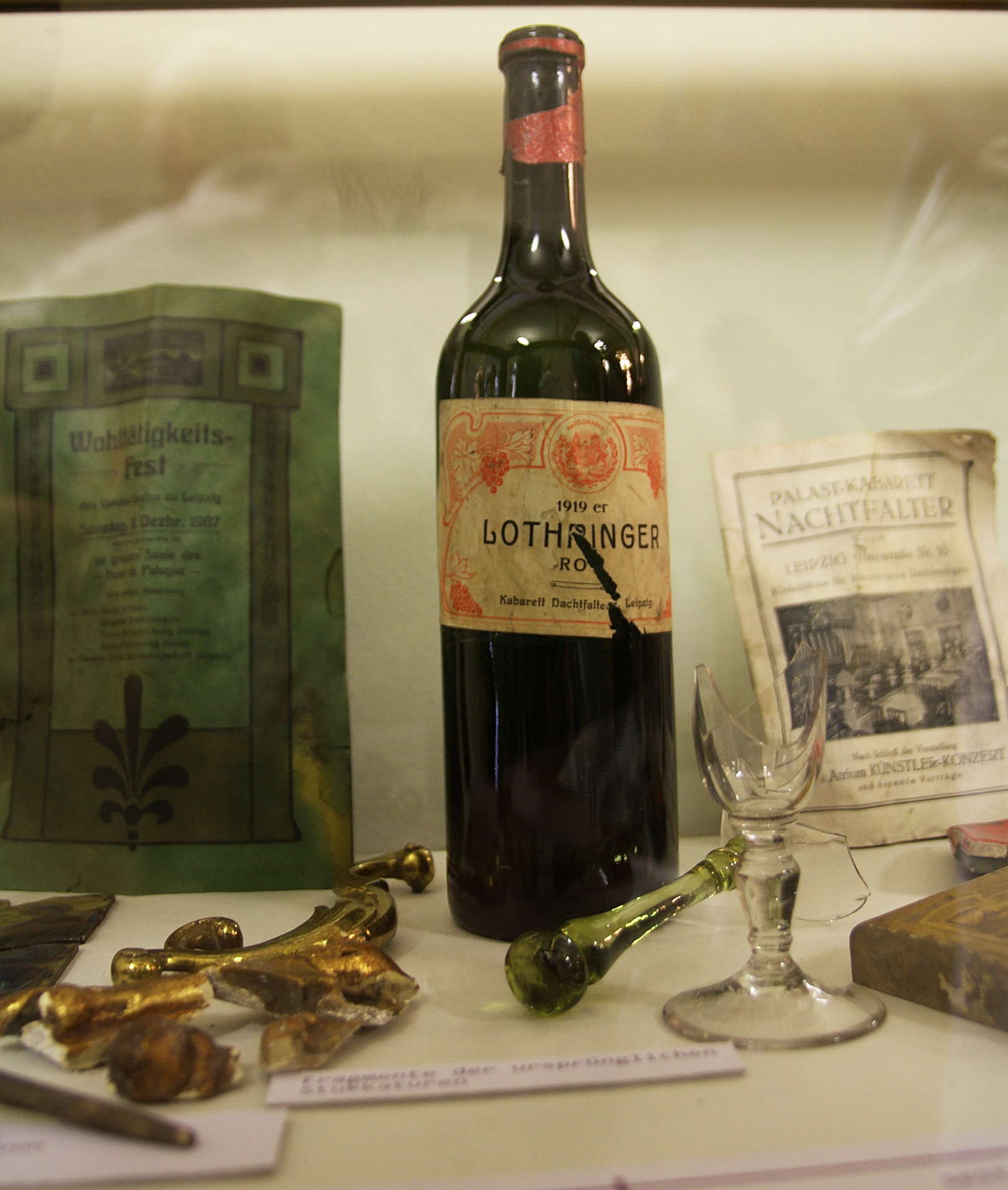 Bei Bauarbeiten gefundener Rotwein von 1919 (Lothringer).